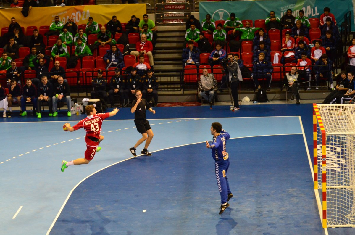 Polonia-Serbia, Mundial Balonmano 2013